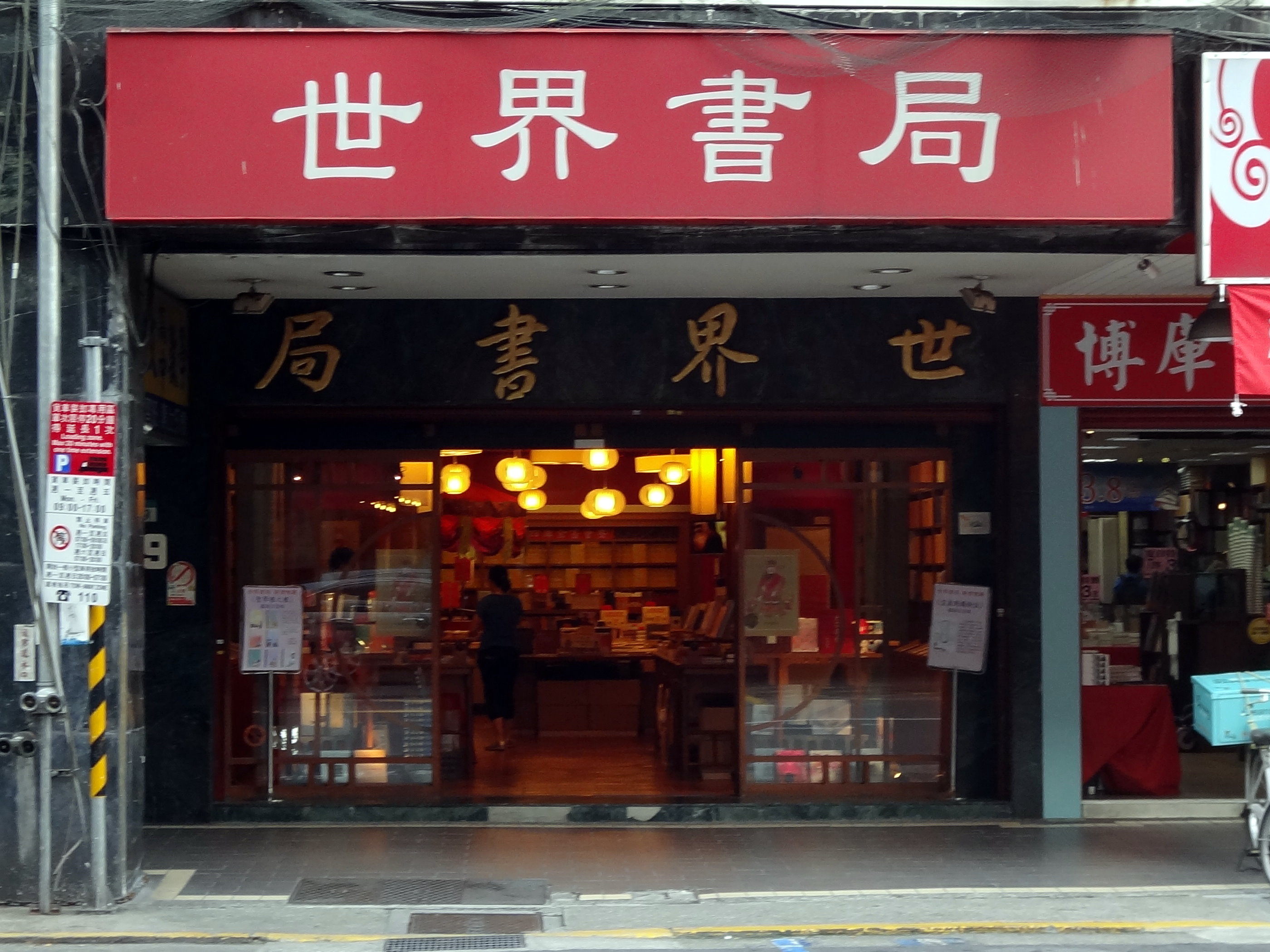 世界書局總部及門市部，地址：臺北市中正區重慶南路一段99號1樓（世界大樓）。